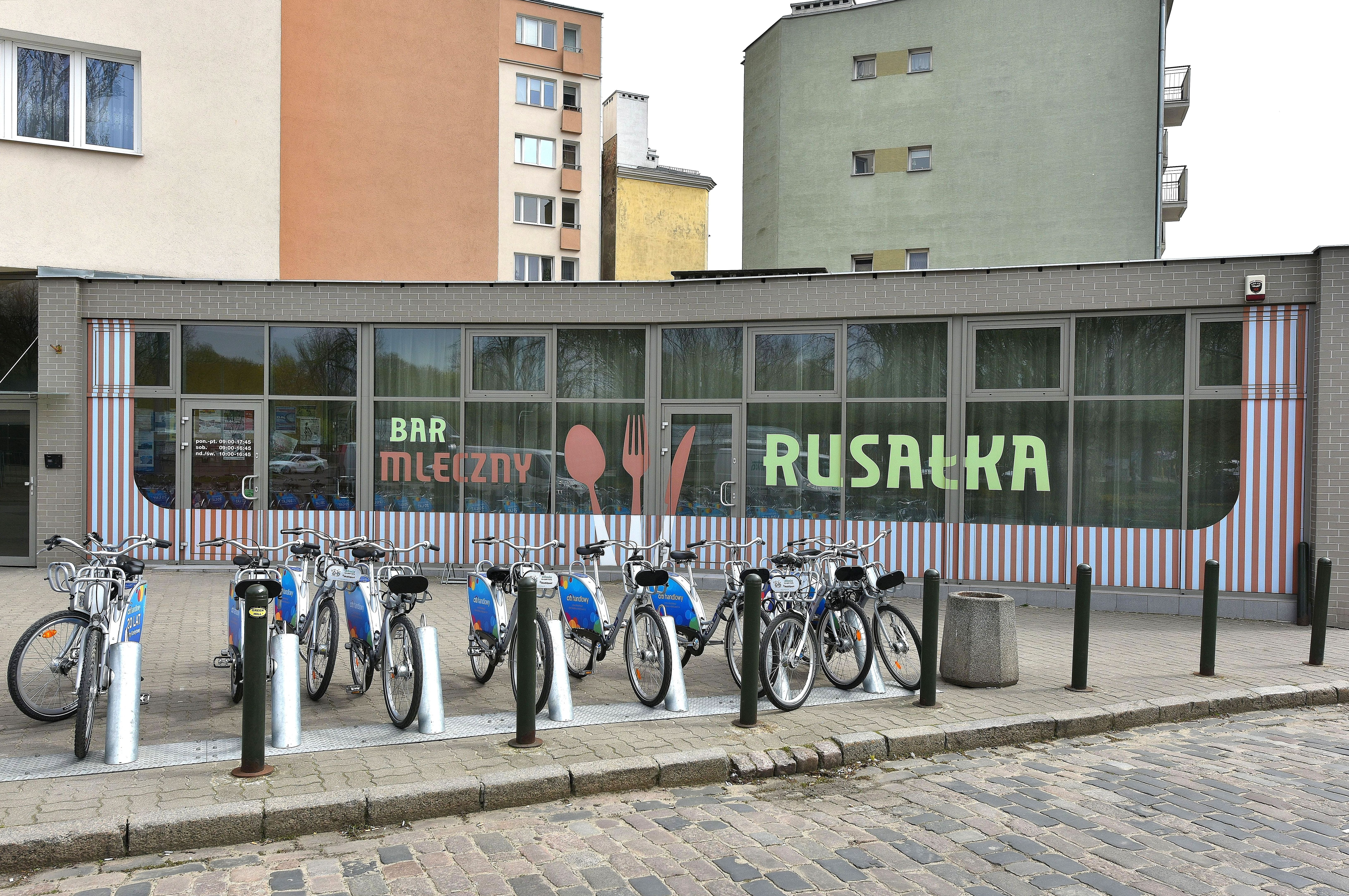 Bar mleczny "Rusałka" przy ul. Floriańskiej 14 w Warszawie